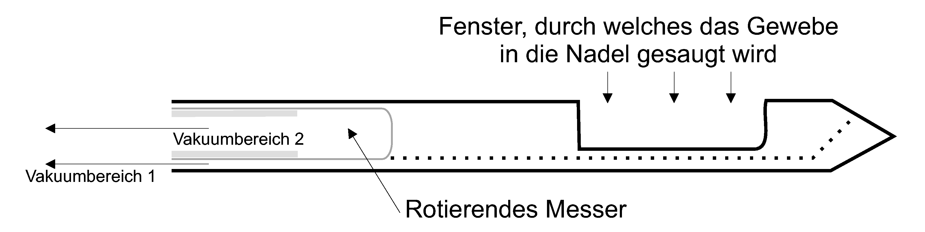 Biopsienadel zur Vakuumbiopsie